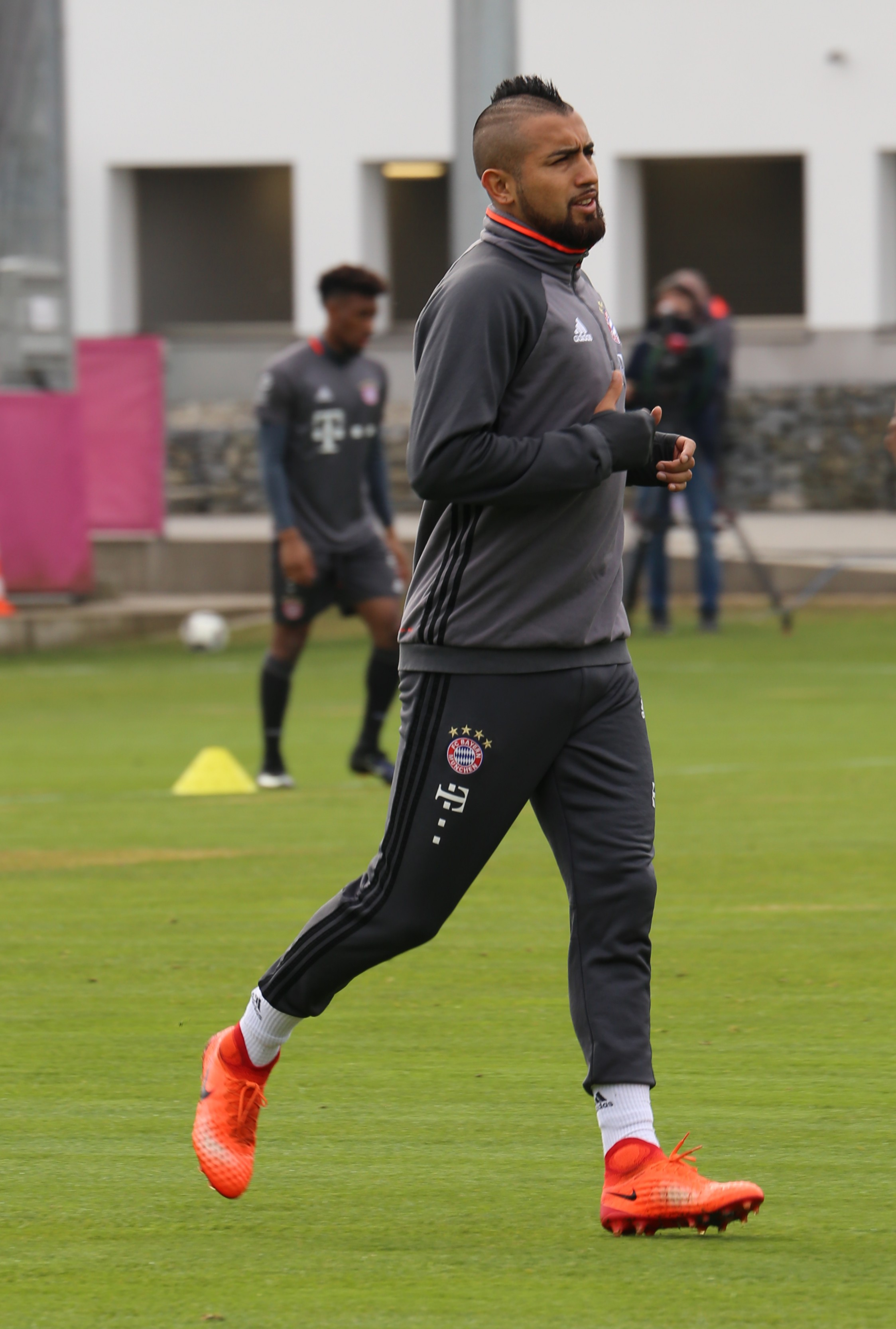 Arturo Vidal, am 14. März 2017 beim Training auf dem Gelände des FC Bayern München